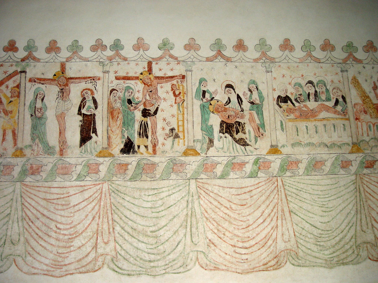 Hamra kyrka (Gotland). Passionsfries (15.Jh.)